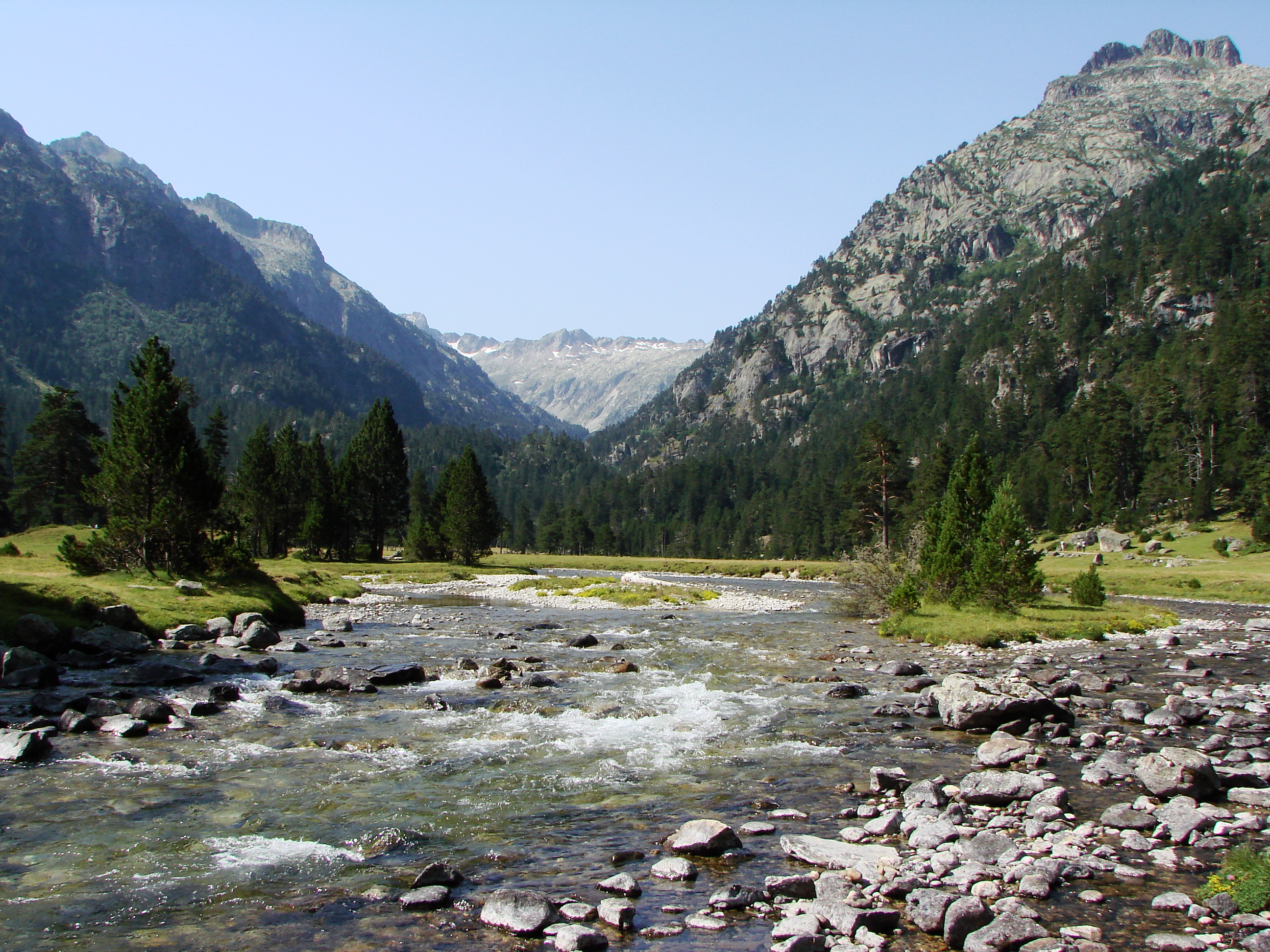 Vallée du Marcadau, Pyrénées françaises, commune de Cauterets, département des Hautes-Pyrénées (France)